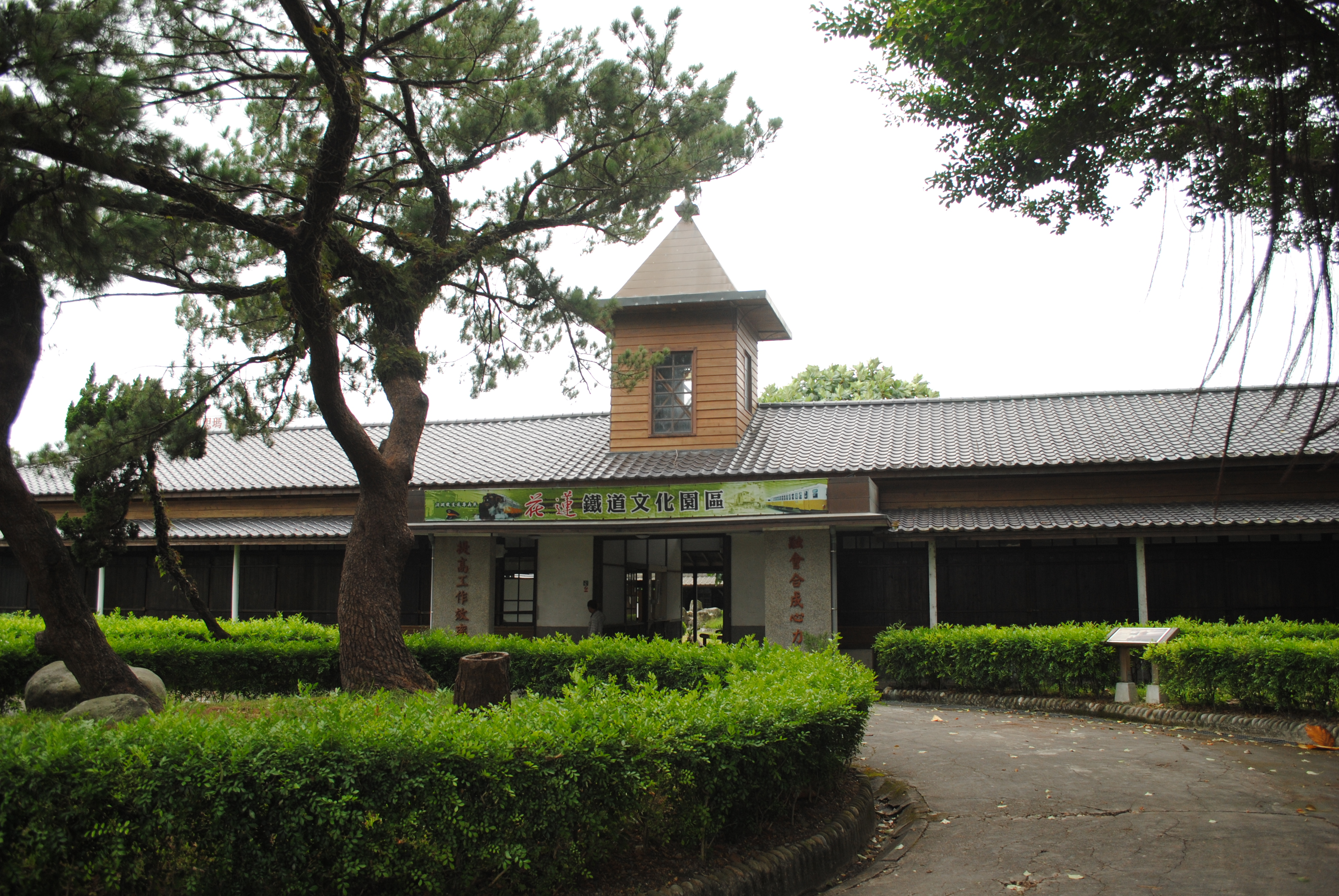 原交通部臺鐵管理局花蓮管理處